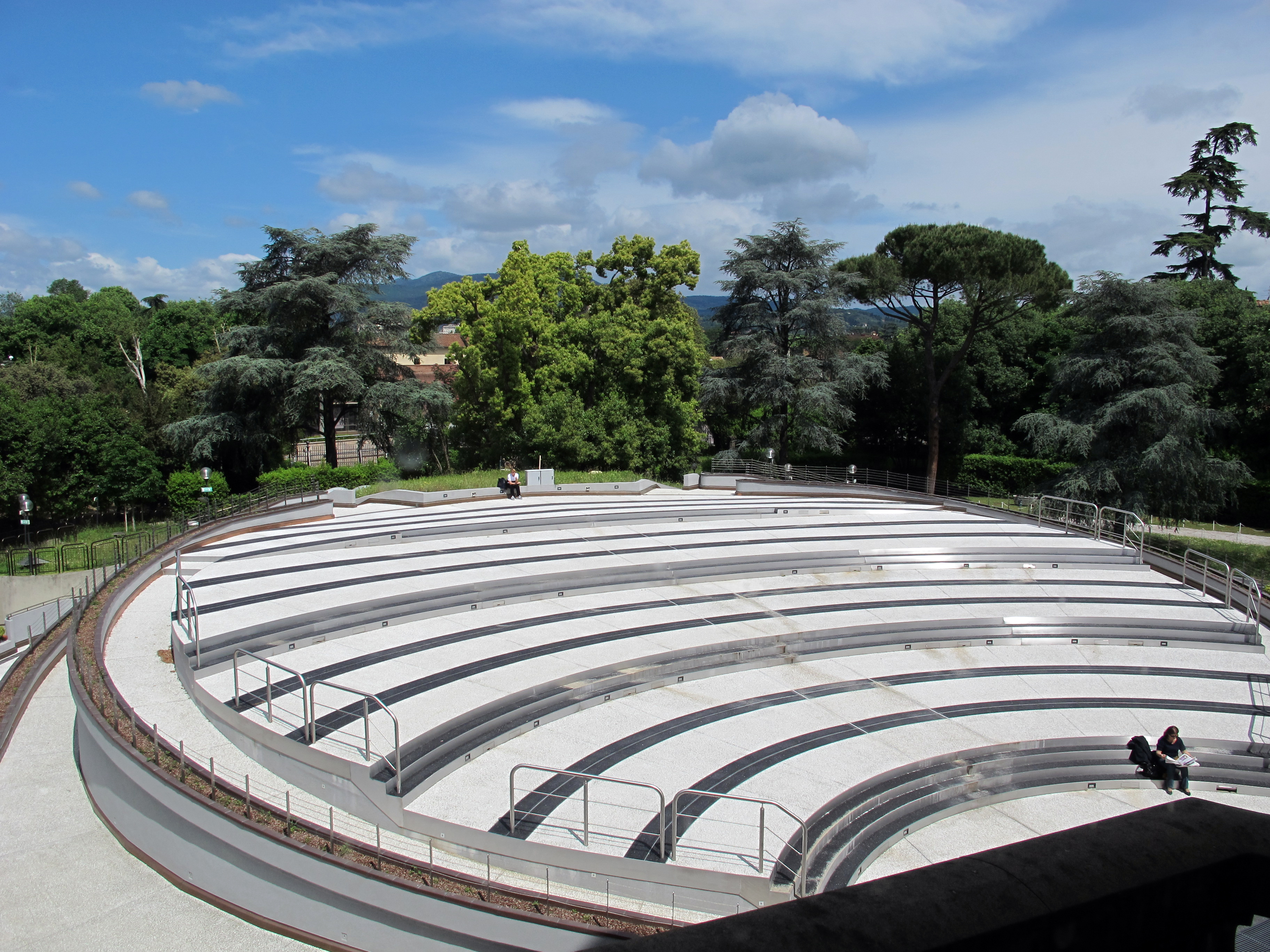 Firenze